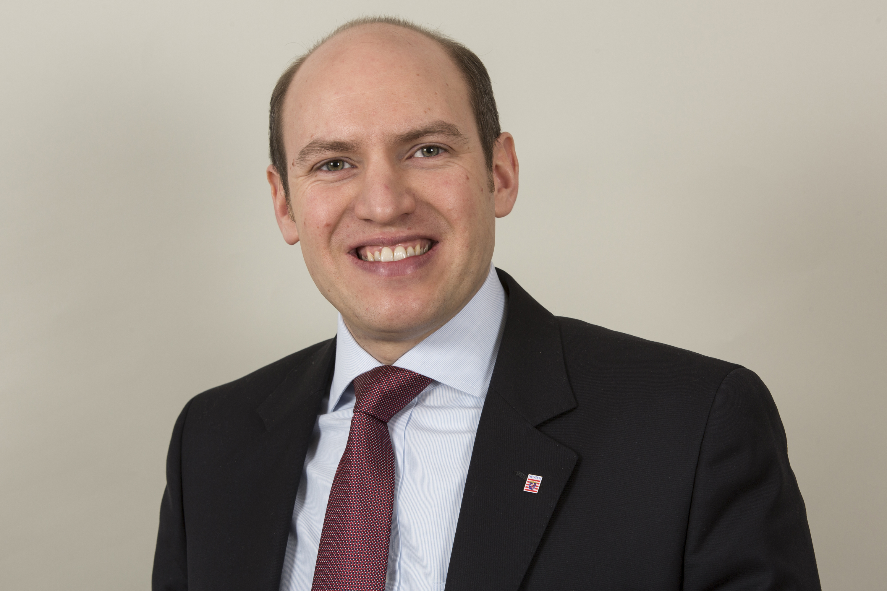 Manfred Pentz, hessischer Politiker (CDU) und Abgeordneter des Hessischen Landtags.